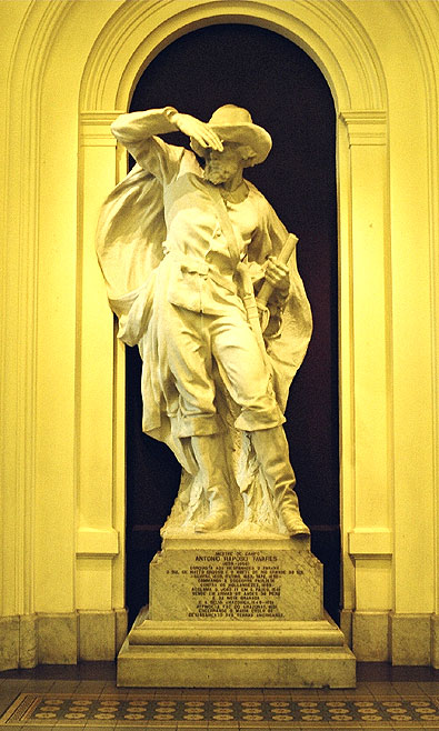 Escultura representando o bandeirante Antônio Raposo Tavares no Museu do Ipiranga. Altura: 3,50 metros. Autor: Luigi Brizzolara.